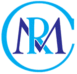 不動産コンサルティングマスターのロゴマーク。 Realestate Consuting Masterの略